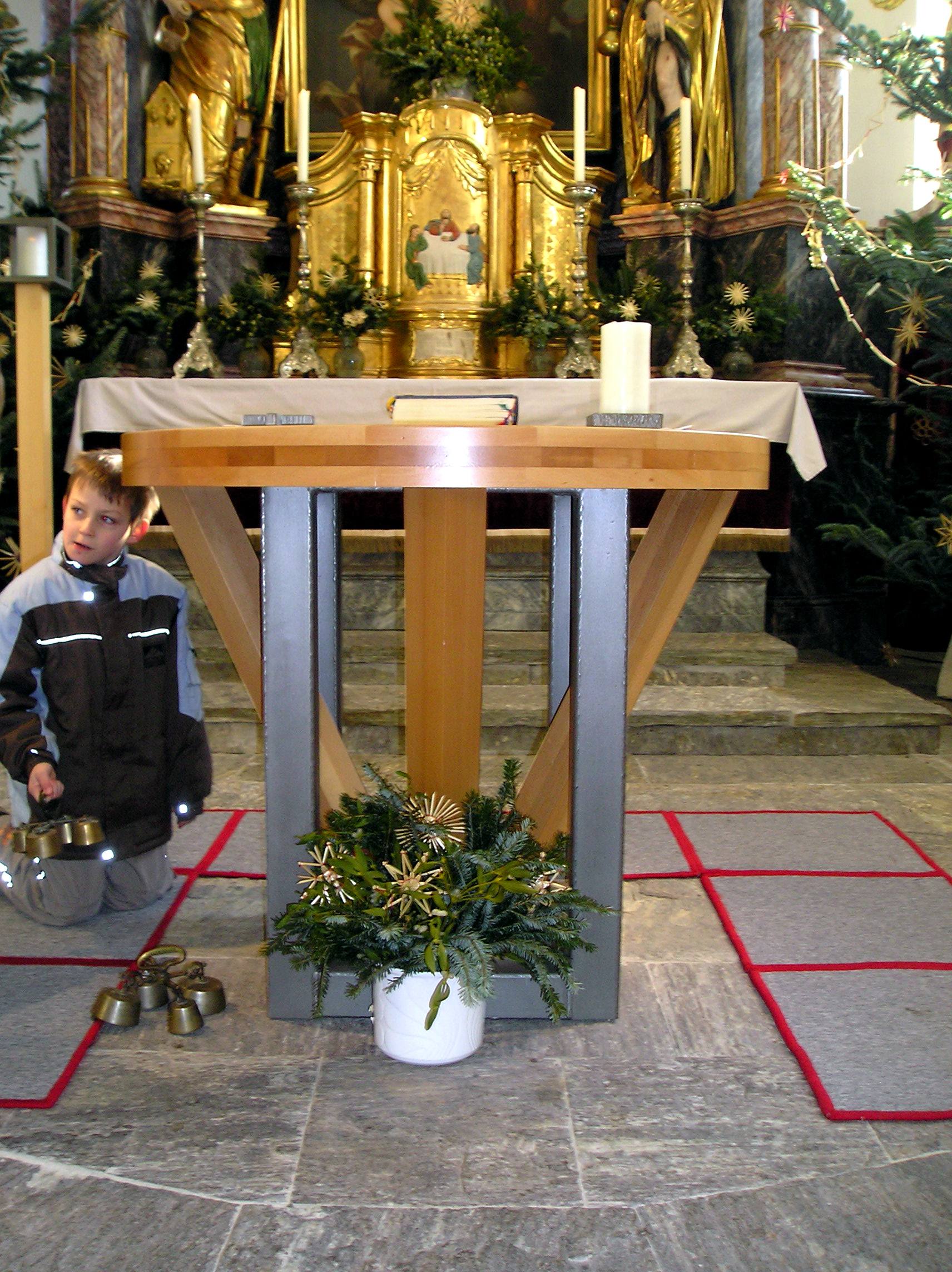 Volksaltar der Pfarre St. Jakob i. Freiland/Steiermark, der Volksaltar der katholischen Kirche bildet den Mittelpunkt der Gemeinde; aufgenommen von Franz Klug am 29.01.2006. Die künstlerische Gestaltung des Volksaltars stammt von Alois Krammer, die handwerkliche Umsetzung wurden von Karl Krammer durchgeführt